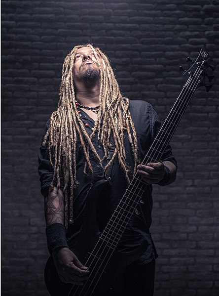 Baffoneto